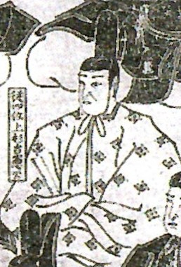 上杉吉憲の肖像。